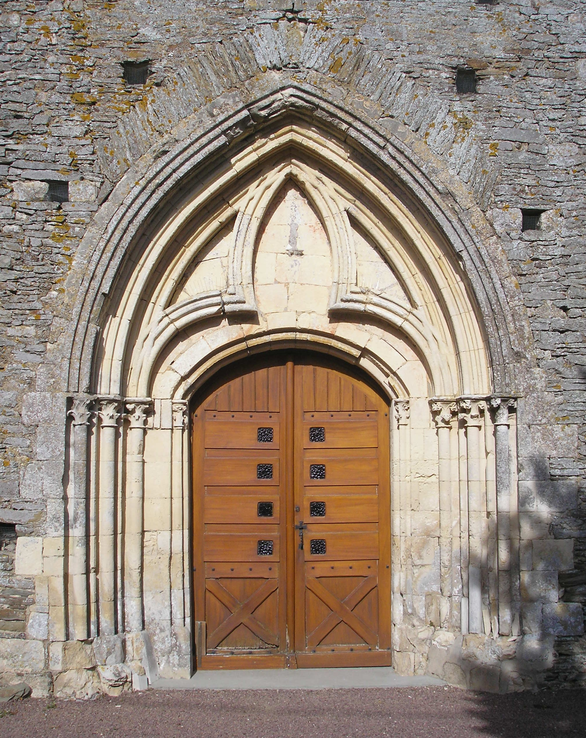 Saint-Louet-sur-Seulles (Normandie, France). Portail de l'église Saint-Louet.